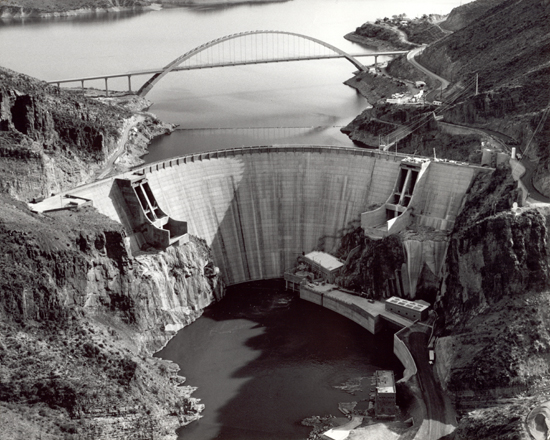 Roosevelt Dam